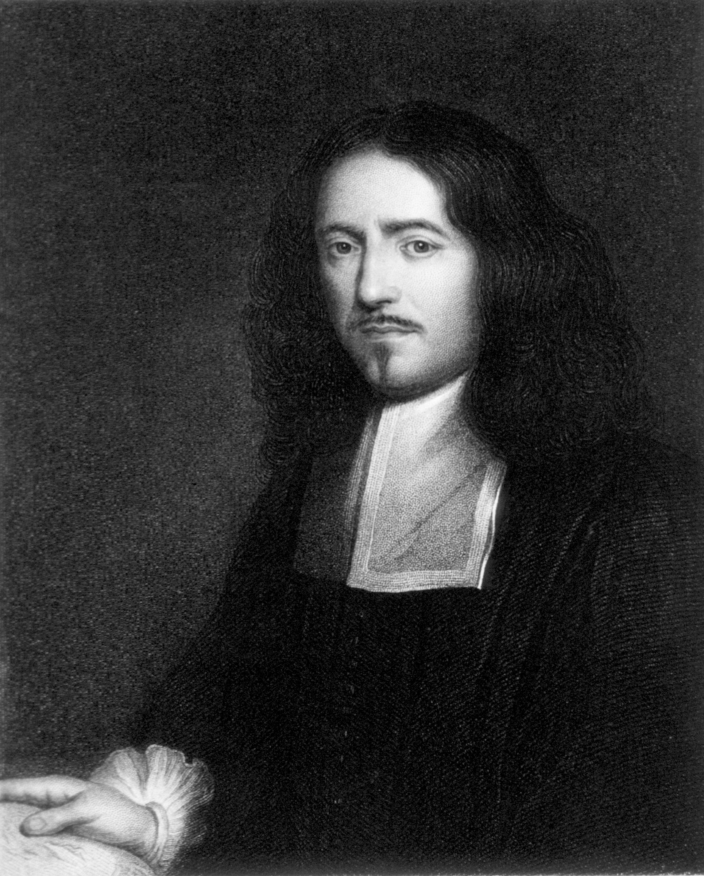 Marcello Malphigi